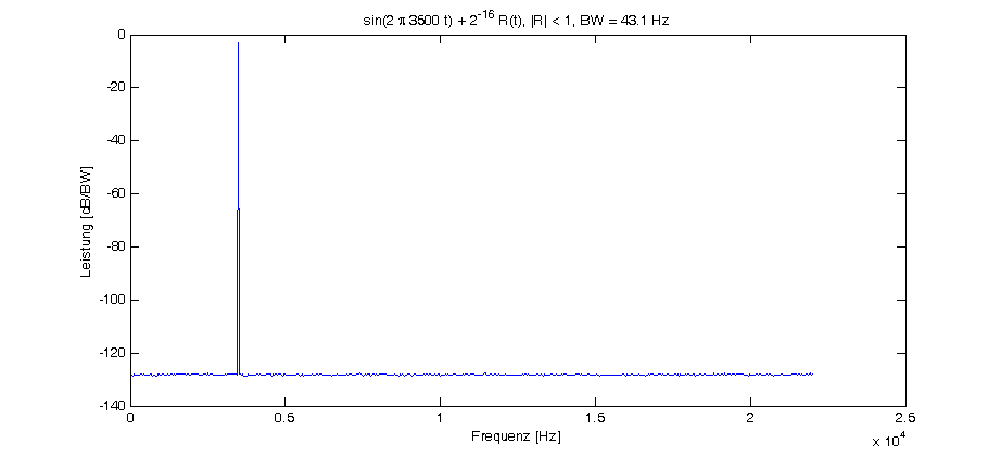 Spektrale Leistungsdichte eines monofrequenten Signals mit Quantisierungsrauschen